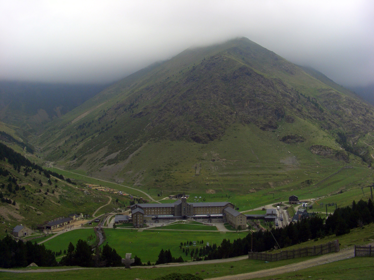 Vall de Núria (Espana).